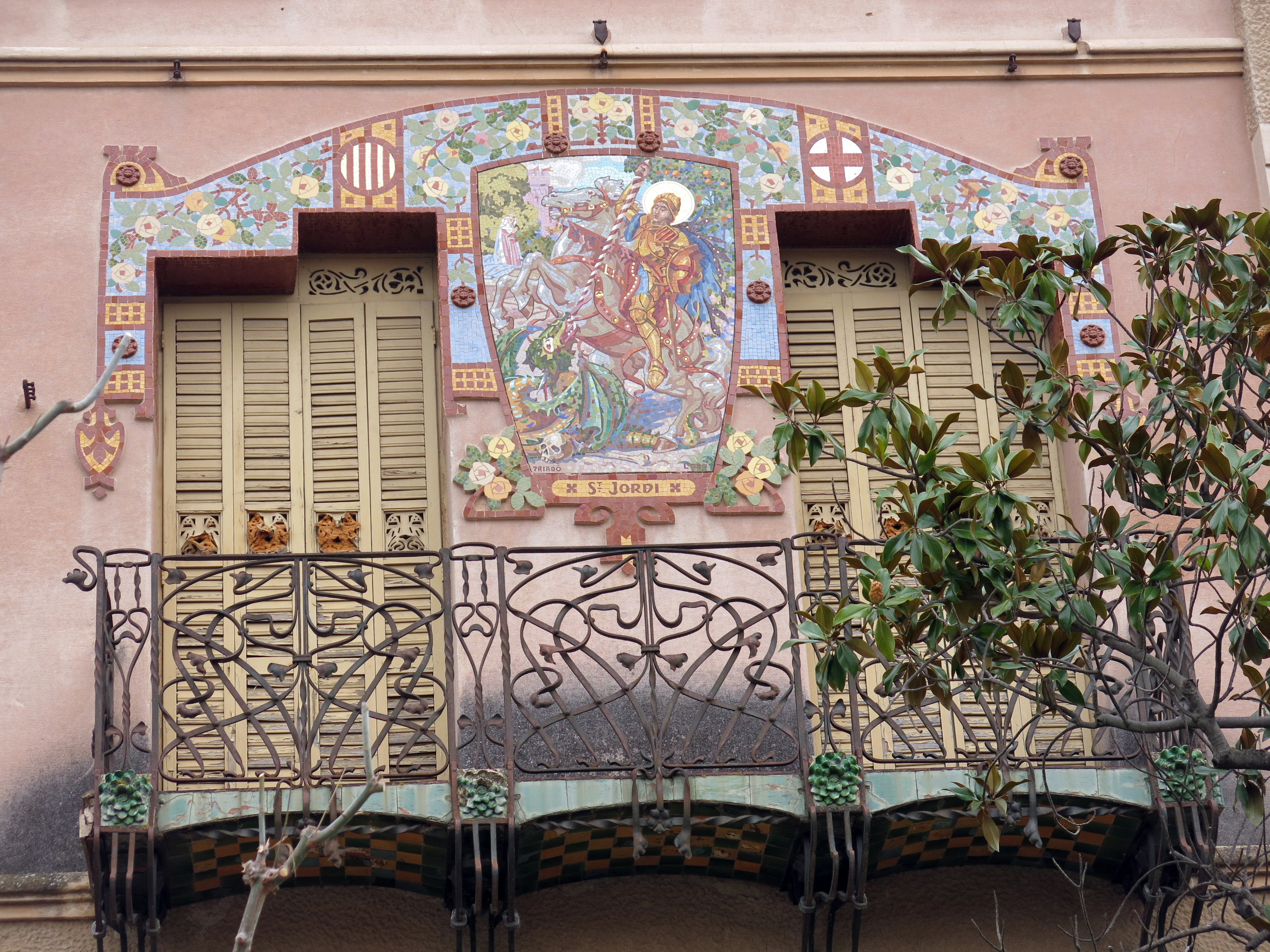 Casa Barbey (la Garriga)